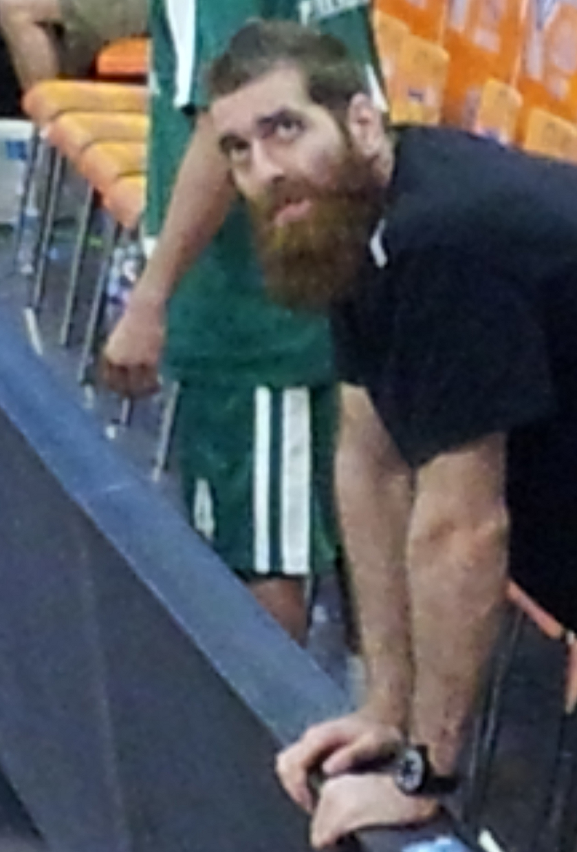 Kostas Kaimakoglou, in Valencia's stadium with UNICS.